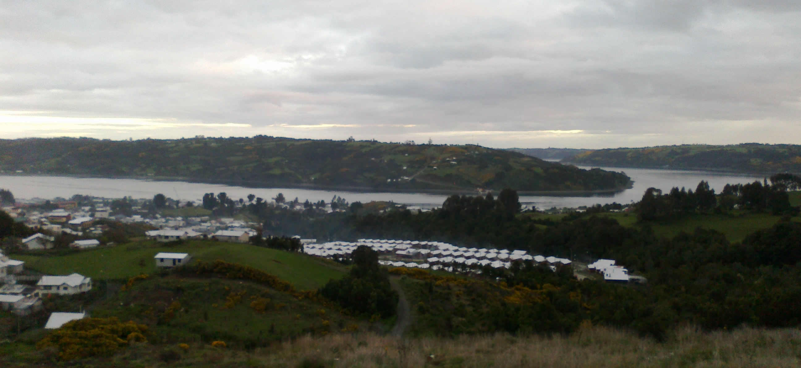 Parte del pueblo de Dalcahue y del canal del mismo nombre. Al fondo, la isla de Quinchao, Chile.